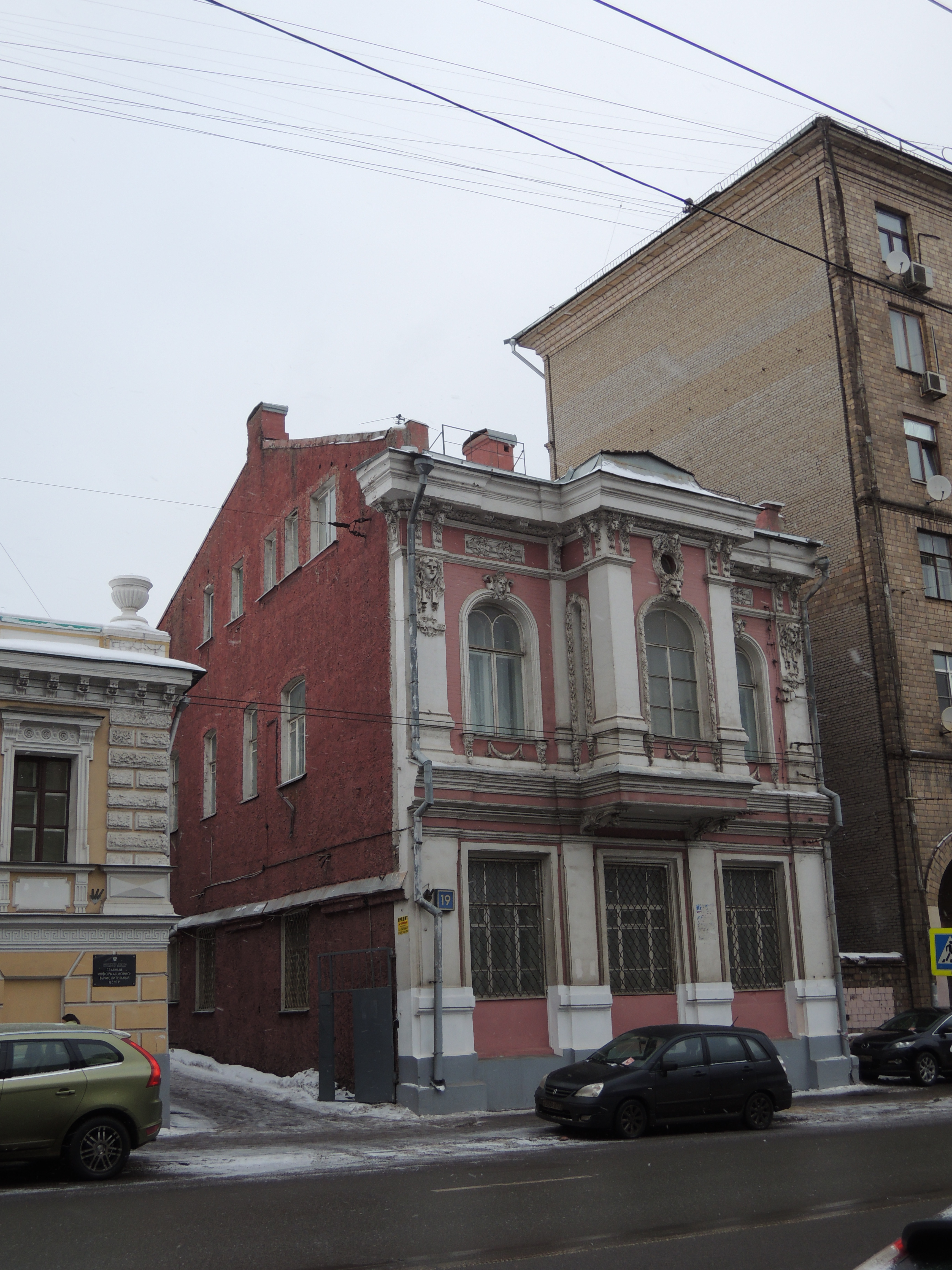 Старая Басманная 19